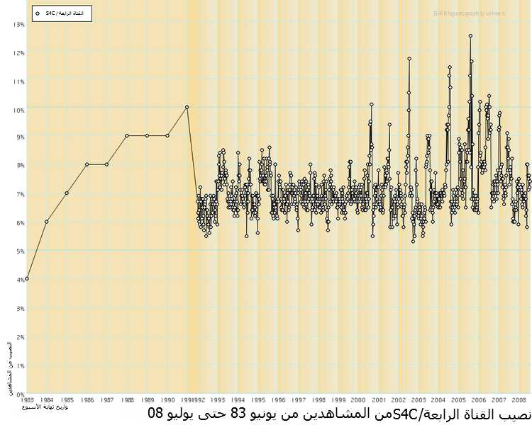 نصيب القناة الرابعة من المُشاهدين 1992-2007 بناءً على أرقام من BARB